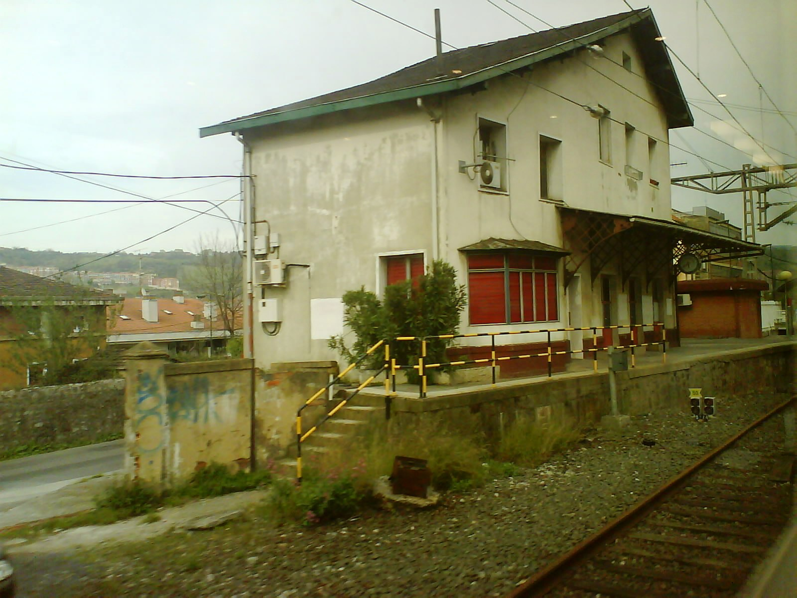 Olabeagako geltokia / Estación de Olabeaga